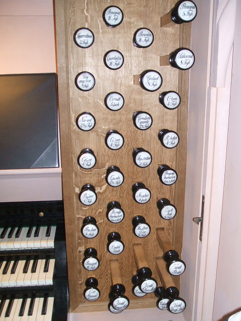 Detail (Register rechst) an der Buchholz-Orgel in der Stralsunder Nikolaikirche, mit "Vox angelica"